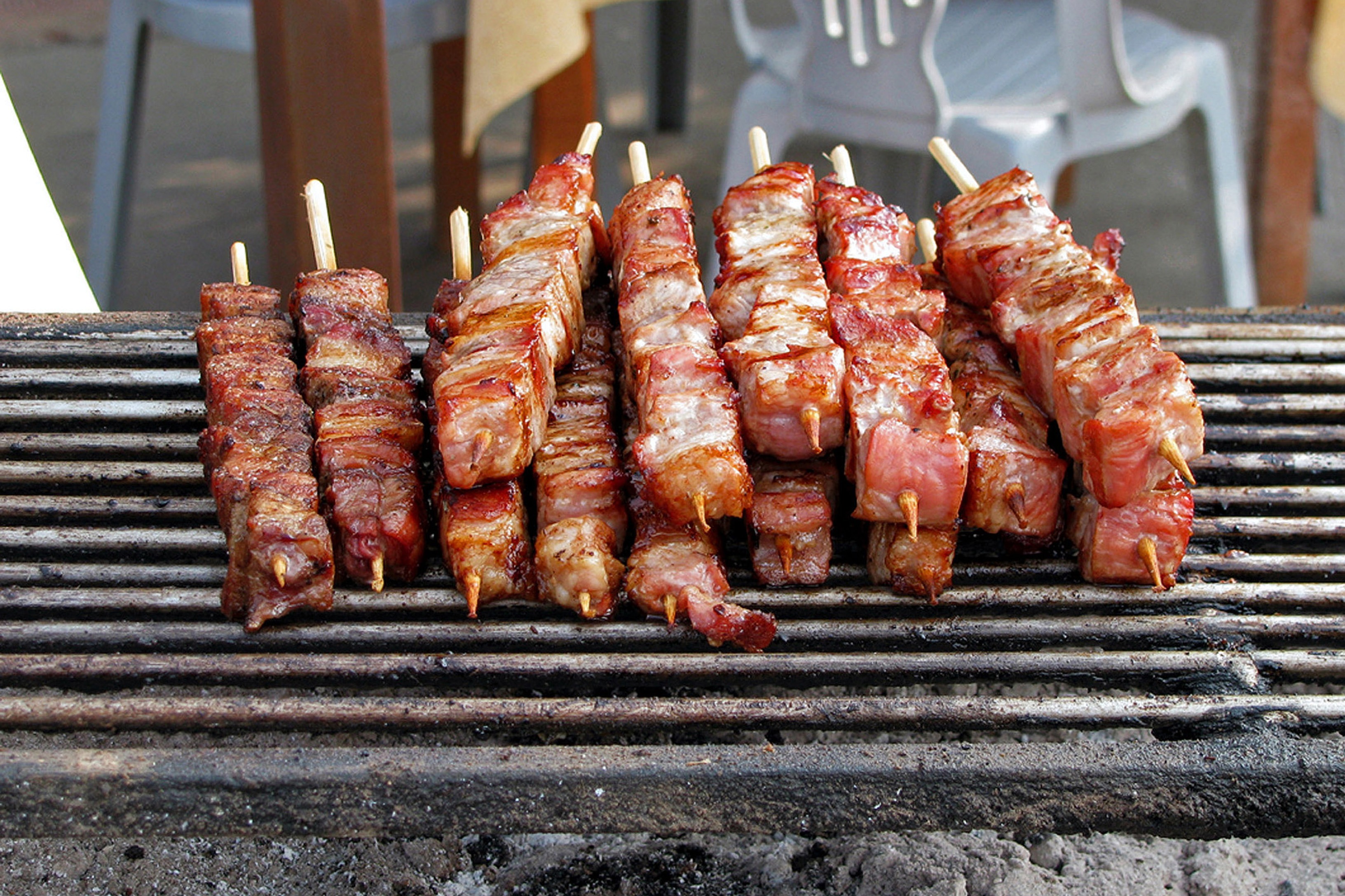 Ελληνικό Σουβλάκι